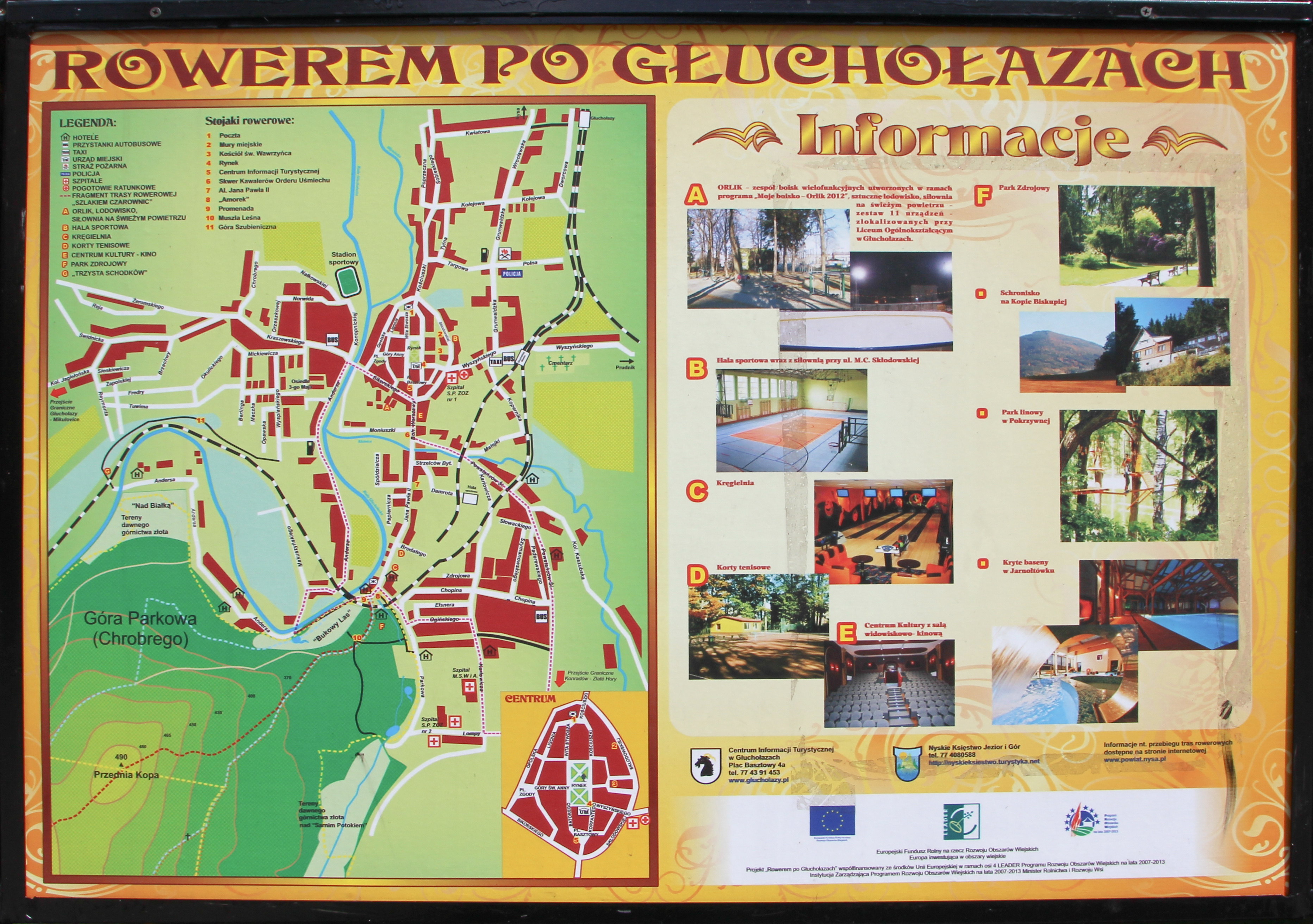 Głuchołazy - miasto w Polsce w województwie opolskim, w powiecie nyskim.